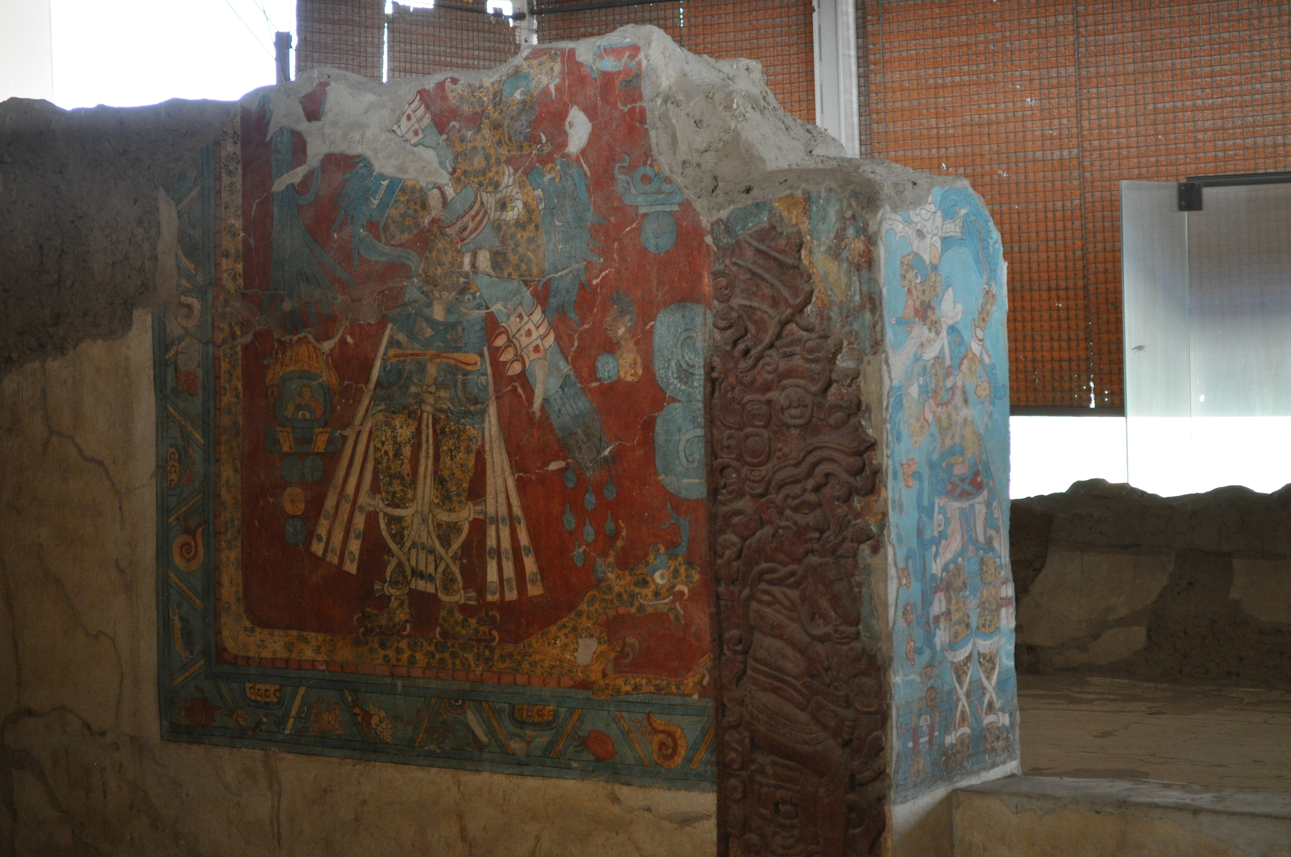 Cacaxtla